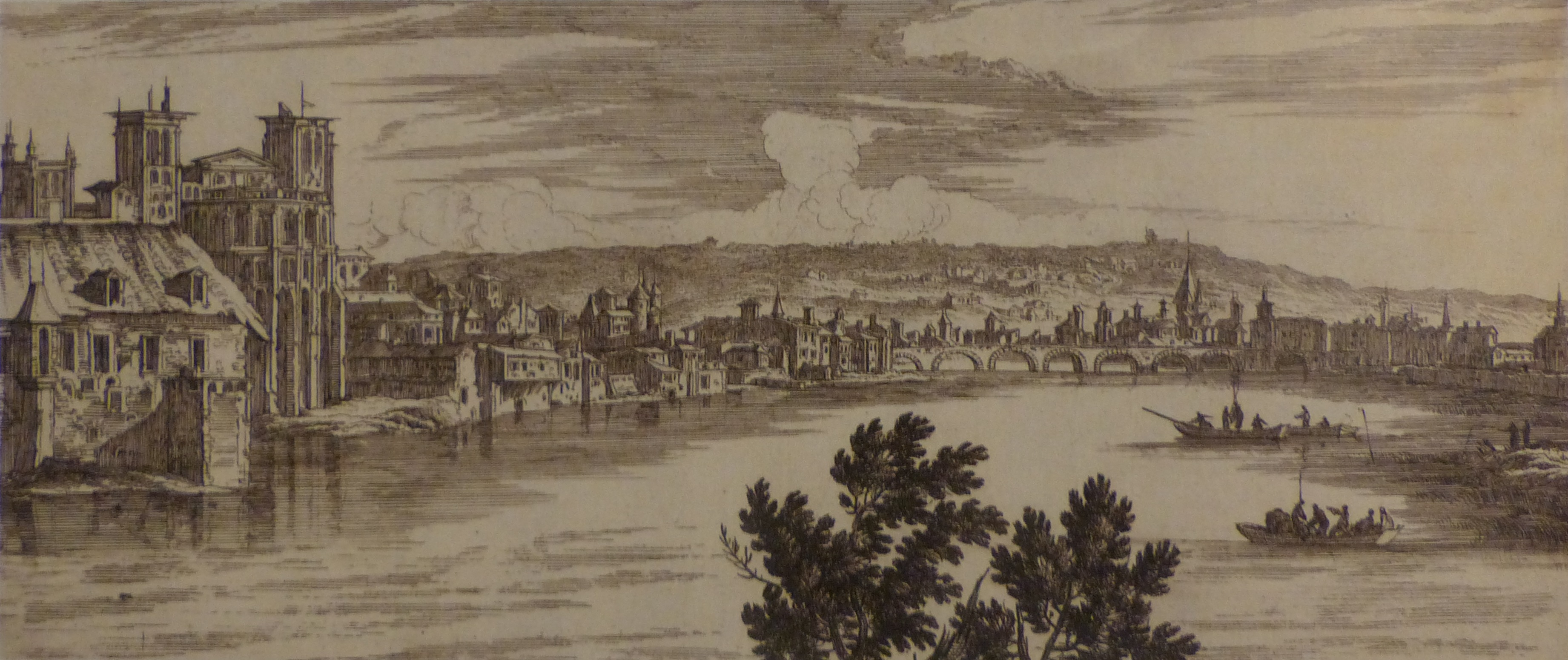 Gravure de Nicolas Langlois (XVIIe siècle) montrant la Saône, la cathédrale Saint-Jean, le pont de pierre et, en fond, la Croix-Rousse